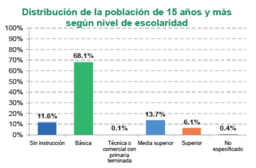 Distribución de la Población según Nivel de Escolaridad